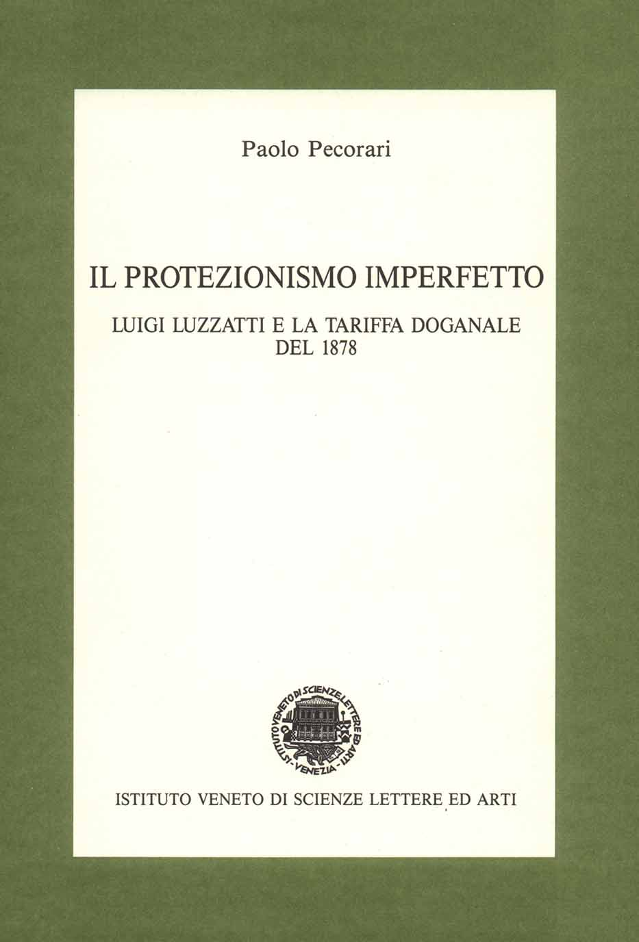 Il protezionismo imperfetto : Luigi Luzzatti e la tariffa doganale del 1878 / Paolo Pecorari. - Venezia : Istituto veneto di scienze lettere ed arti, 1989. - 451 p. ; 24 cm. - (Biblioteca luzzattiana ; 1) .